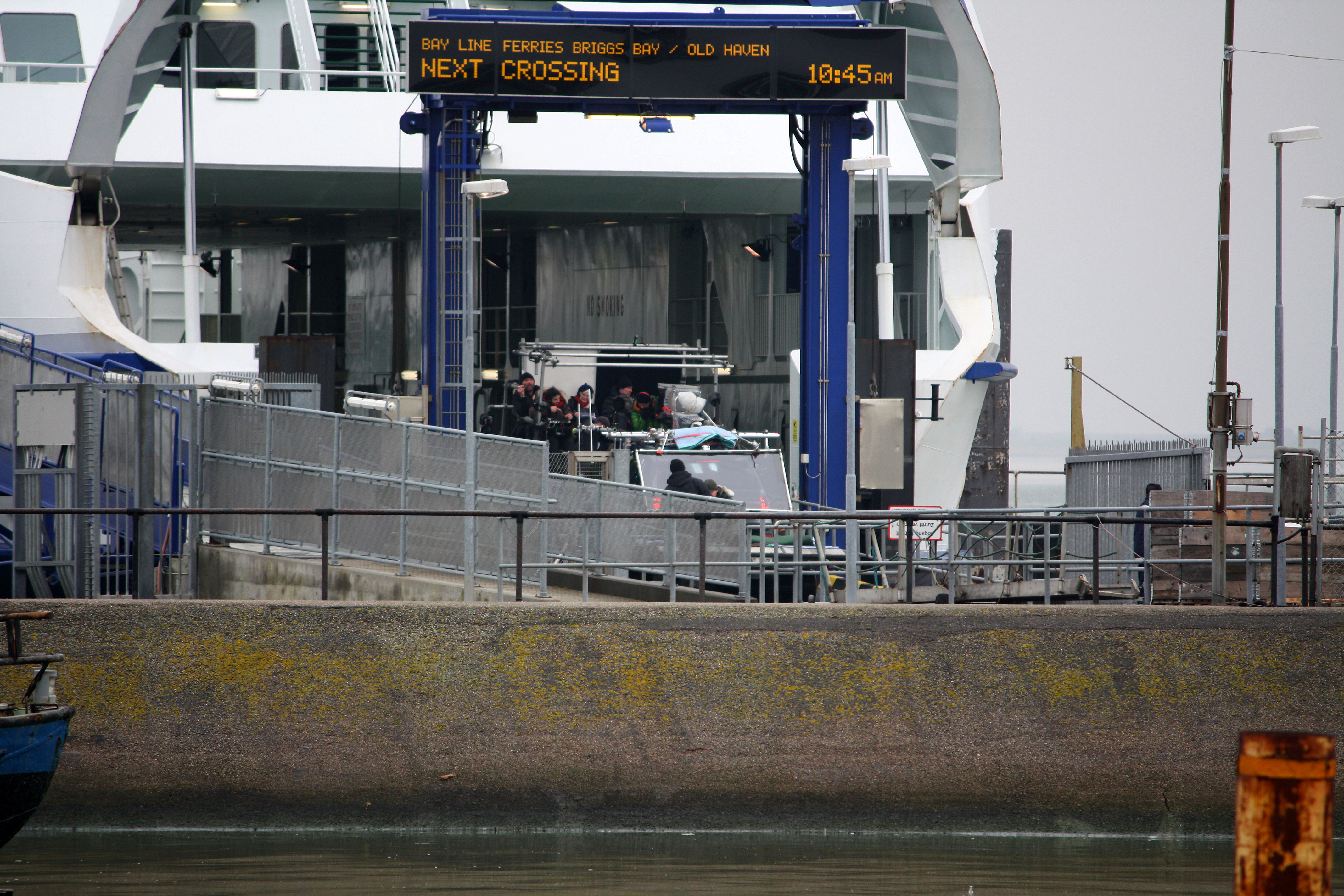 SETPHOTO: Am Set von Roman Polanskis Kinofilm "The Ghostwriter". Die Drehcrew im Hafen von Havneby auf der dänischen Insel Römö. Ein Kamerawagen probt das Filmen der Fahrt des BMW-Geländwagens von Ewan McGregor bei seiner Flucht vor Auftragskillern auf eine US-amerikanische Fähre. Tatsächlich handelt es sich bei dem Fährschiff um ein Exemplar der Römö-Sylt-Linie.